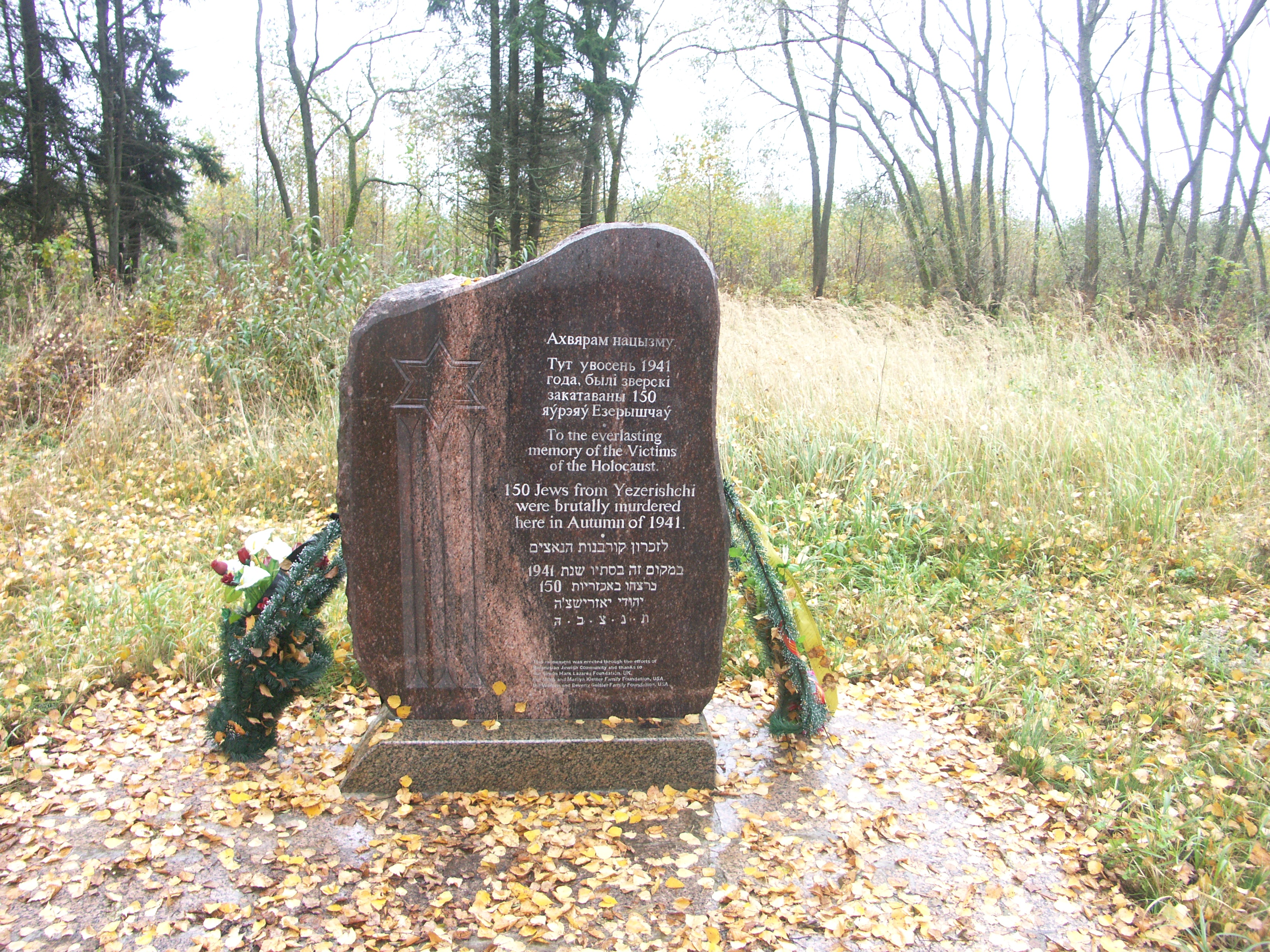 Новый памятник евреям Езерища, убитых нацистами осенью 1941 года. Установлен в 2007 году.